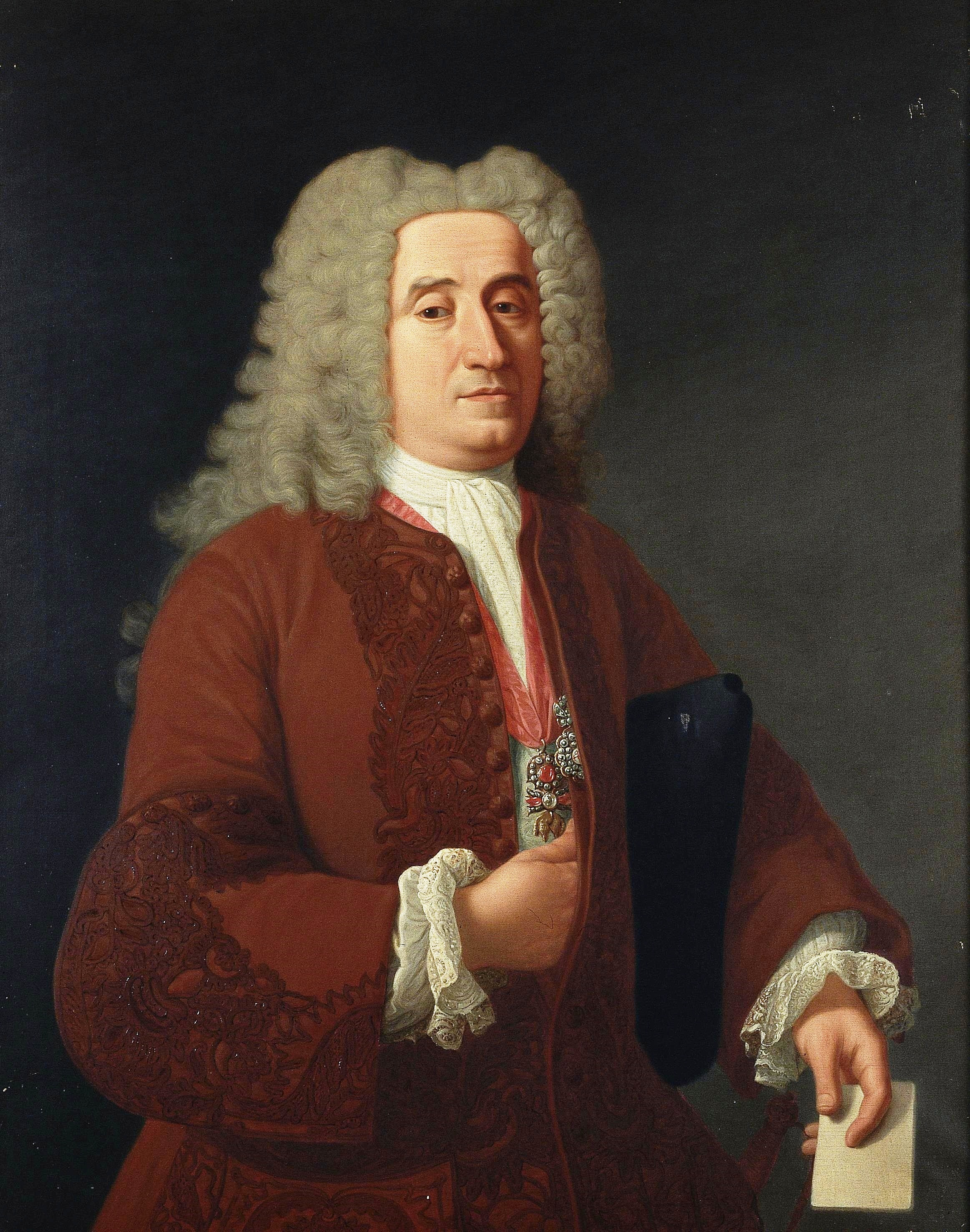 Retrato de José Patiño Rosales (1666-1736), que fue intendente general de la Armada, secretario de Marina e Indias, y también de Guerra y de Hacienda durante el reinado de Felipe V de España. Esta obra es una copia realizada en 1878 por Estaban Aparicio de un retrato de José Patiño pintado por Jean Ranc que se conservaba en la colección de la condesa de los Villares.